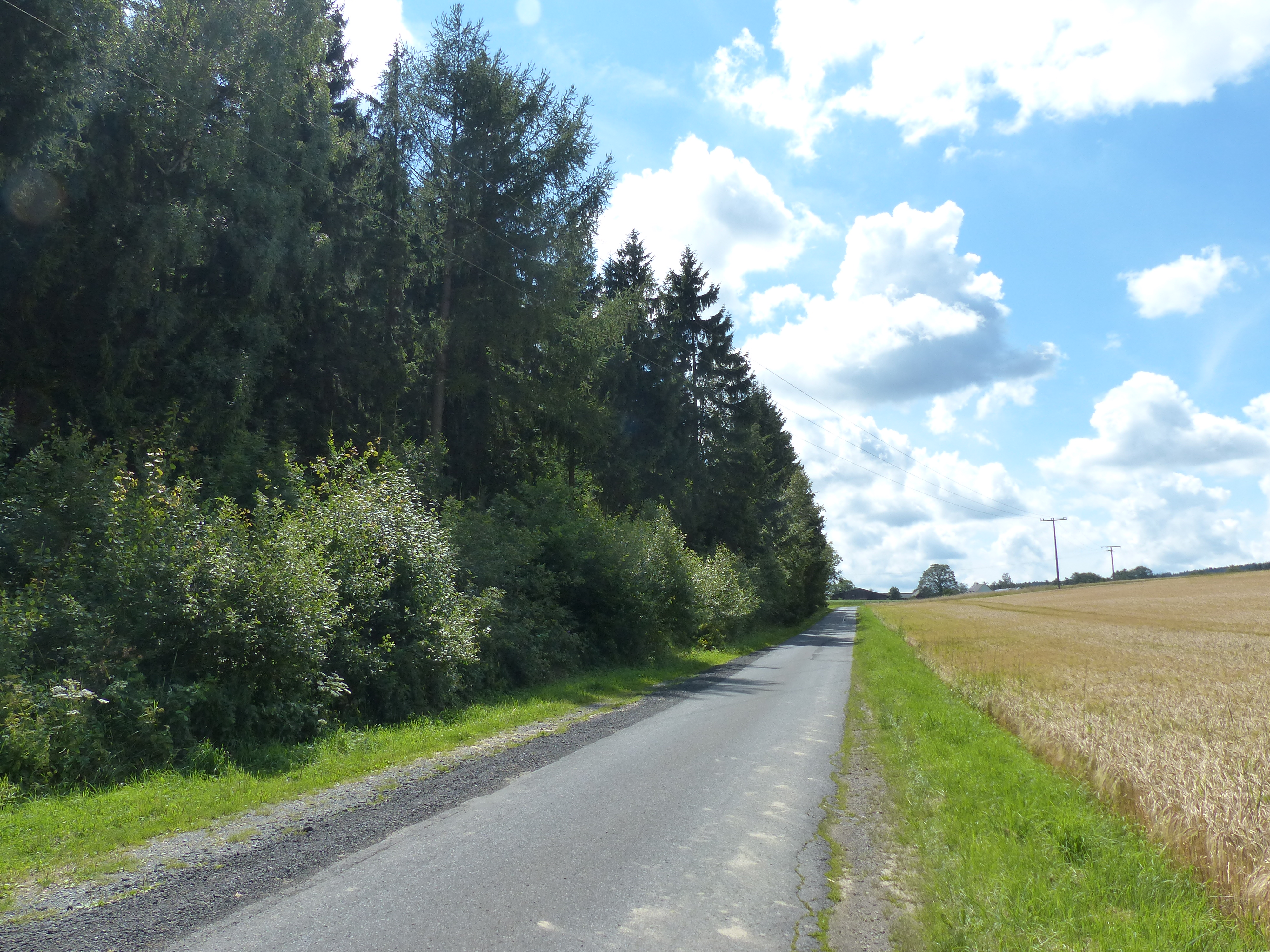 Gelände der Grube Christa